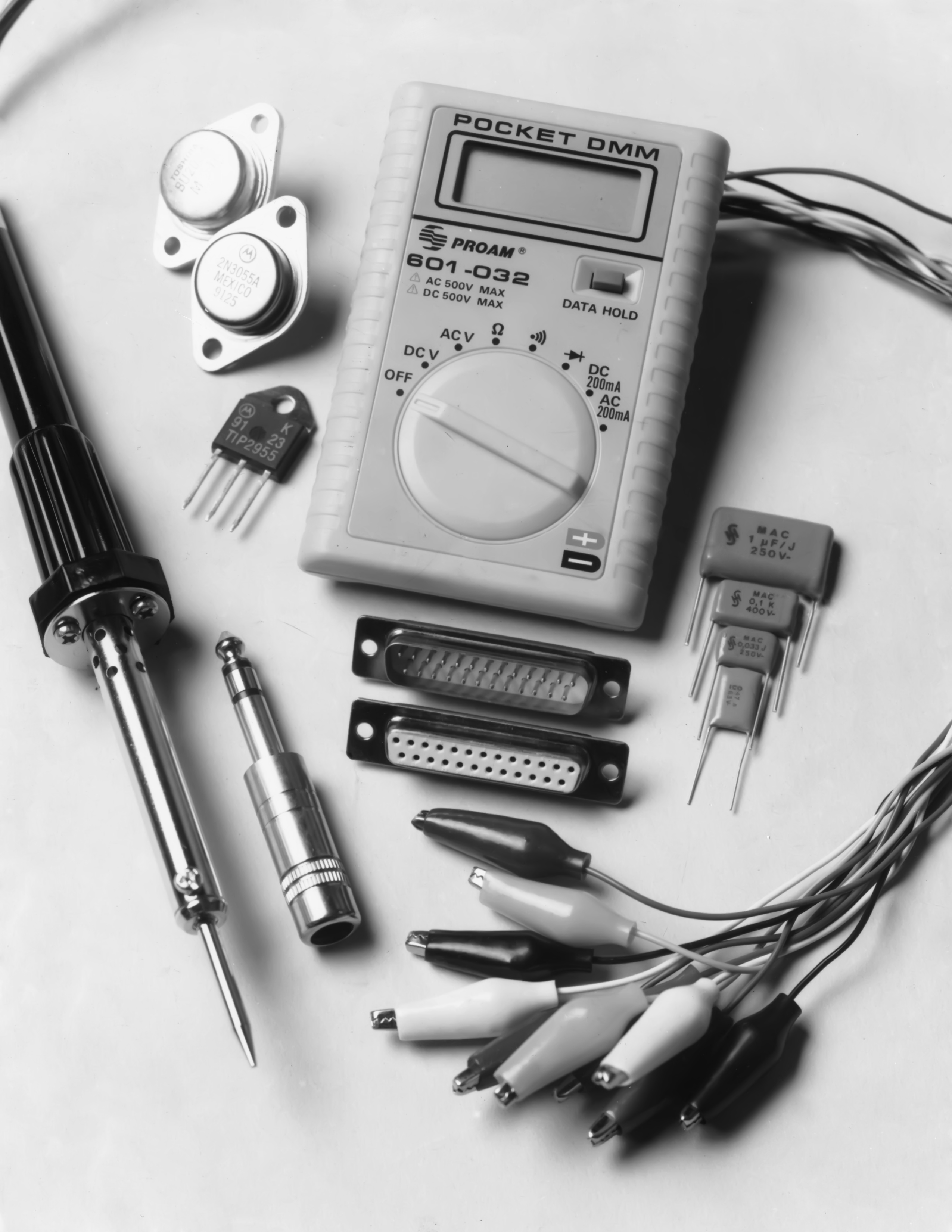 producto oldie steren